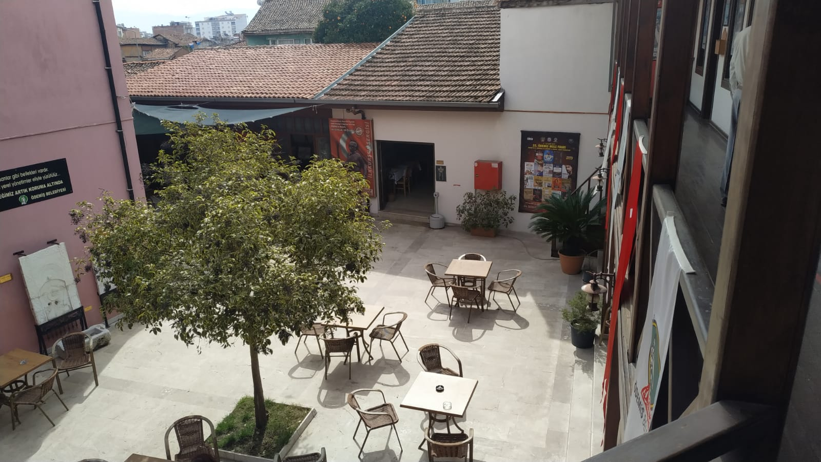 Ödemiş Yıldız Kent Arşivi ve Müzesi Bahçesi